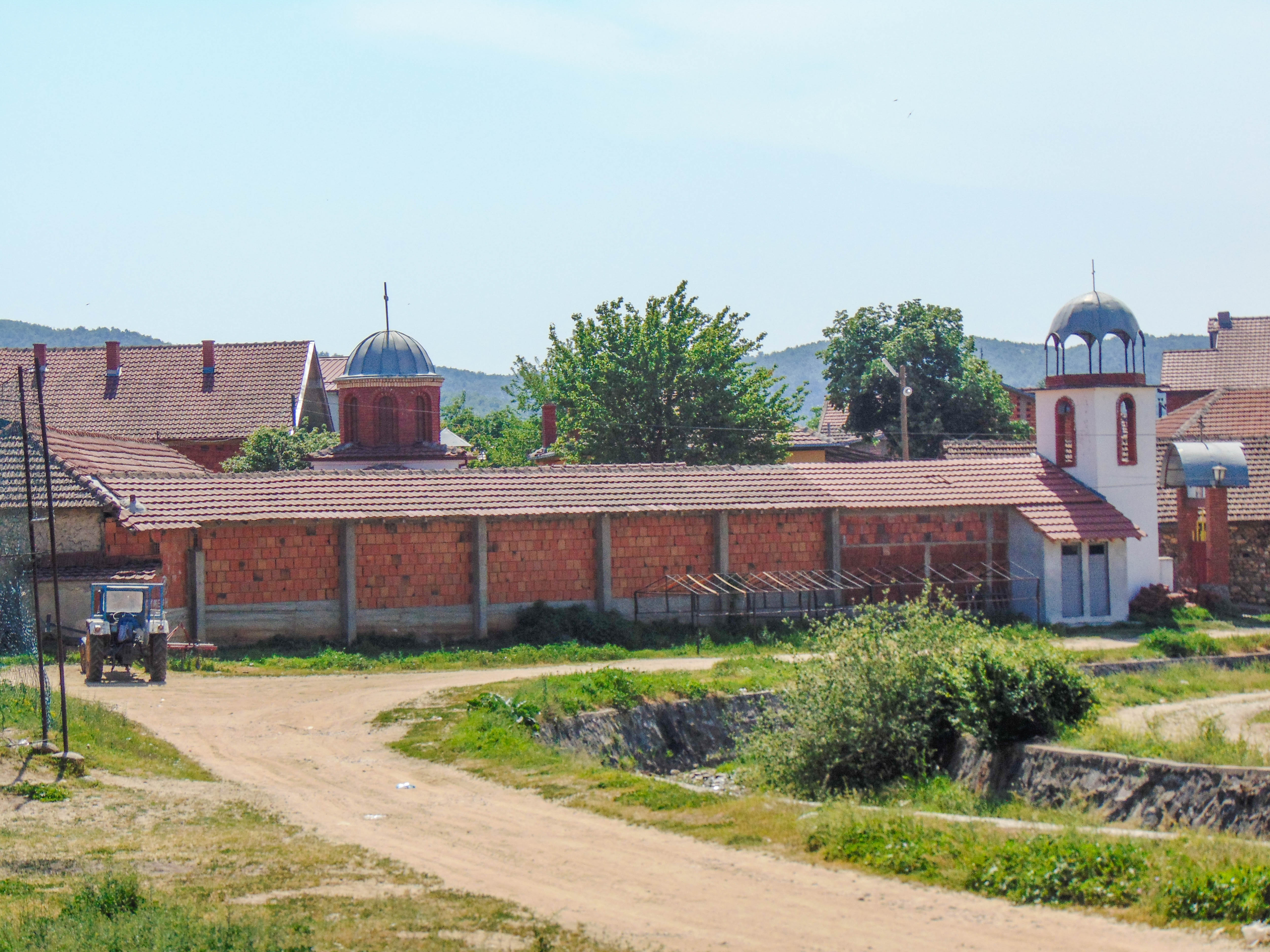 Црква „Св. Илија“ - Подареш